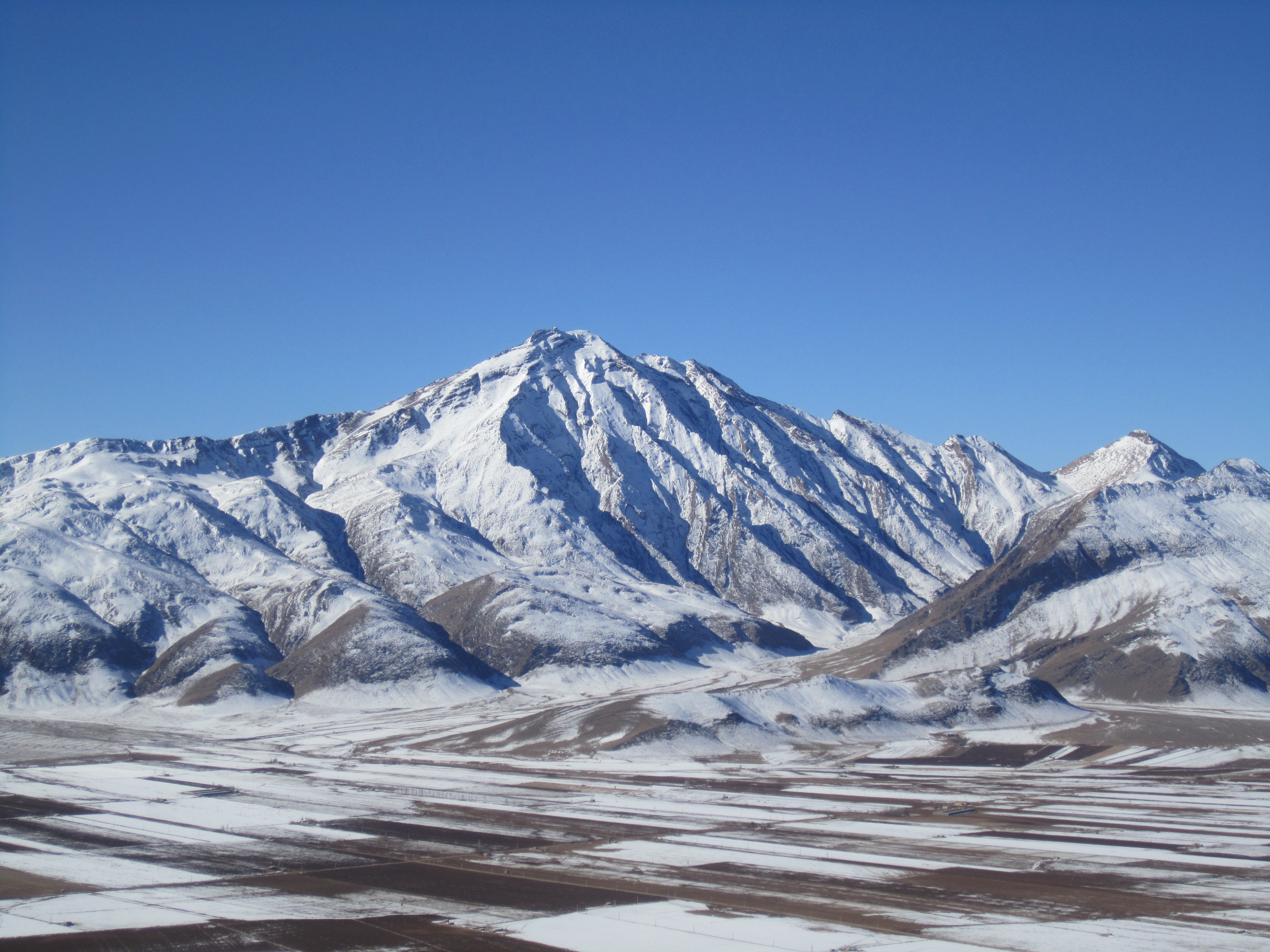 قله داراب شاه